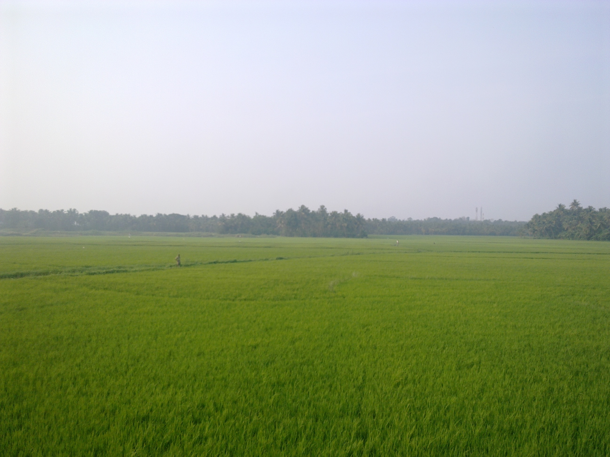 തൃശ്ശൂരിലെ ഒരു നെൽപാടം.